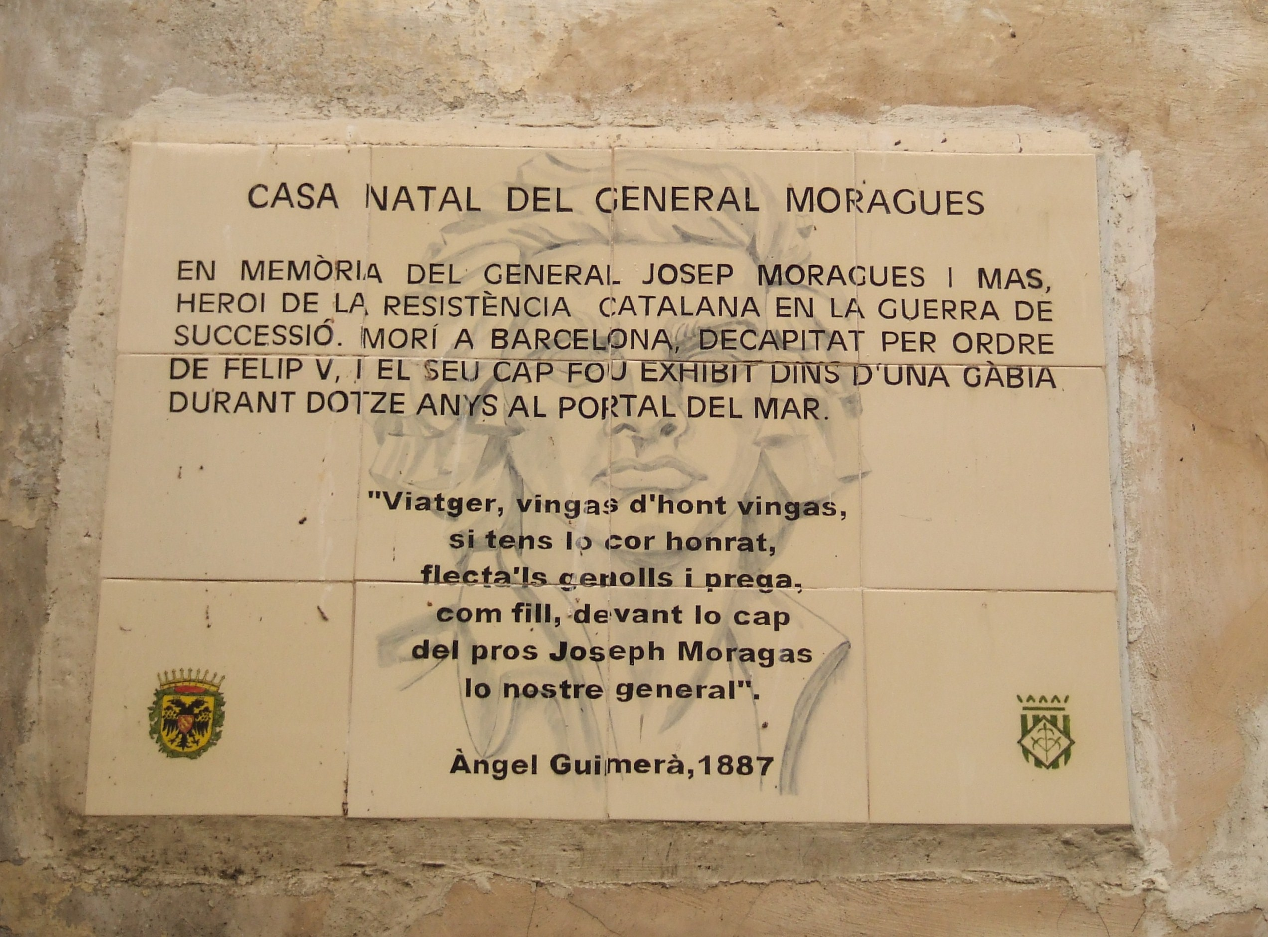 Placa dedicada al General Josep Moragues, a la casa on residí de Sort (Pallars Sobirà).